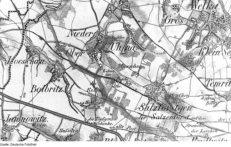 Original image description from the Deutsche Fotothek Bautzen-Bolbritz. Oberreit, Sect. Bautzen, 1844/46